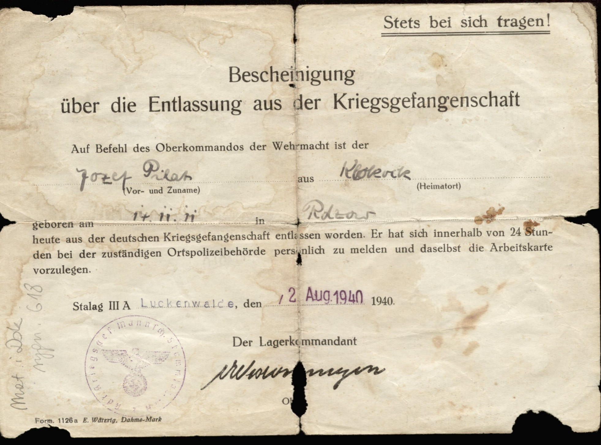 Potwierdzenie zwolnienia z niewoli